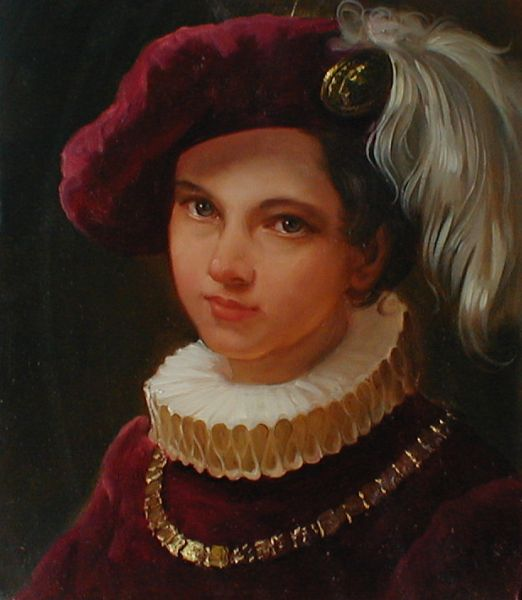 Мальчик дворянин